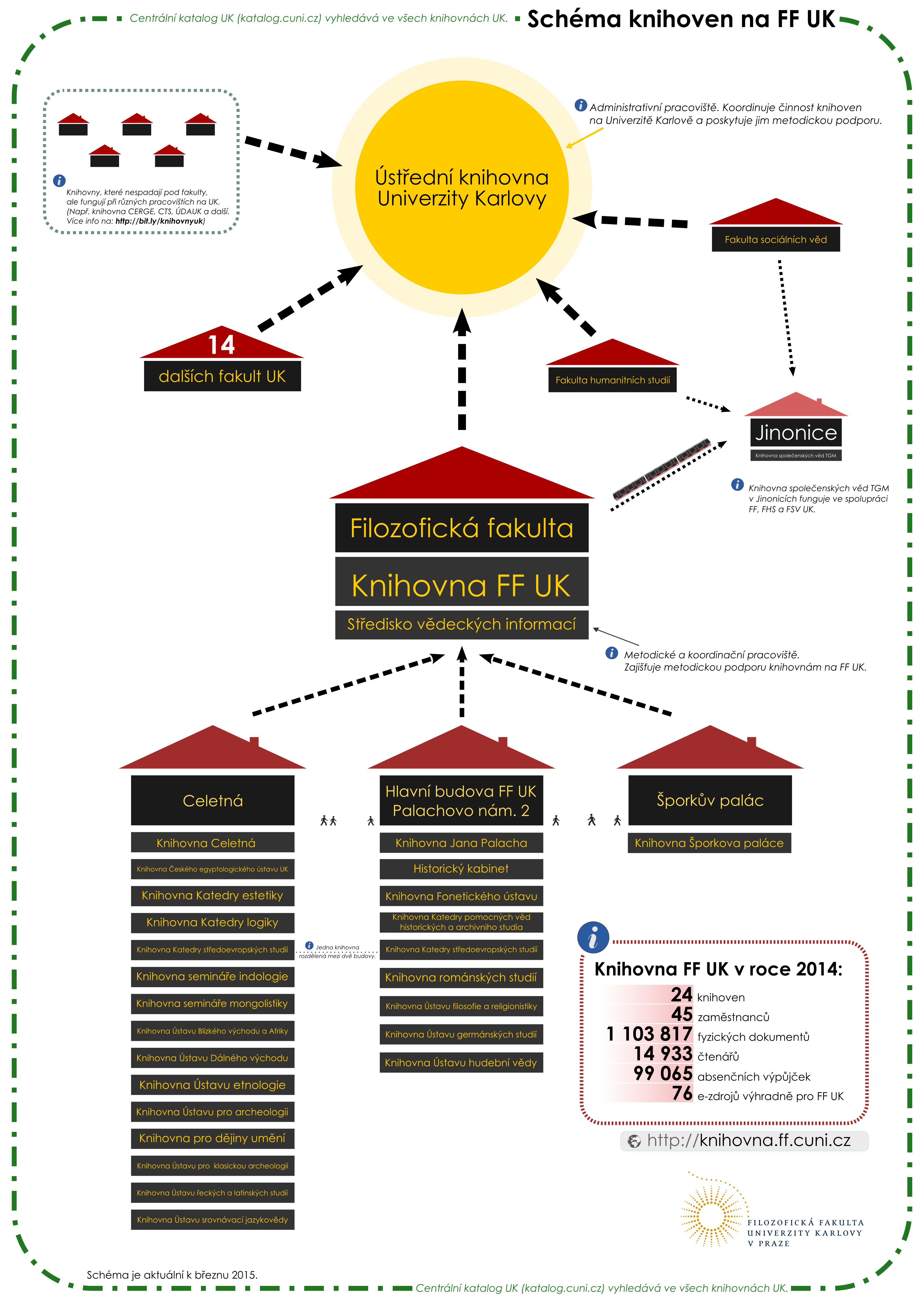 Schématické knihoven spadajících pod Knihovnu Filozofické fakulty Univerzity Karlovy v Praze.